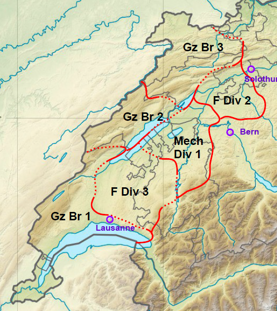 Räume Feldarmeekorps 1, Schweiz